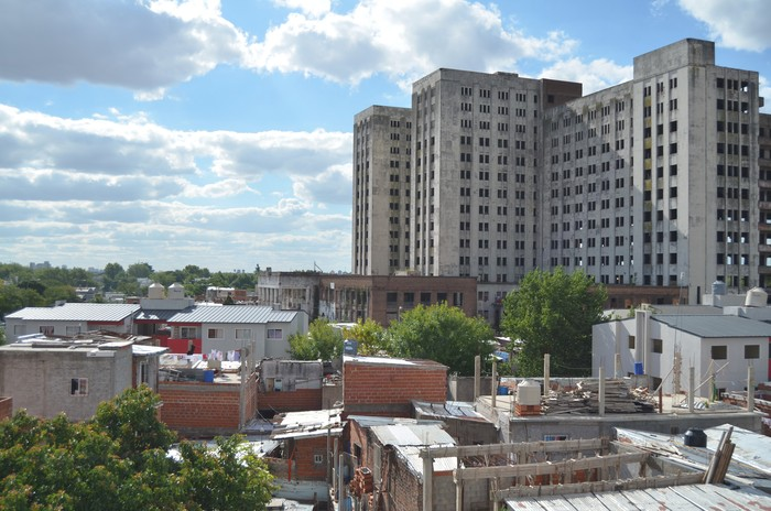 Edificio Elefante Blanco, en Villa Lugano, Buenos Aires.